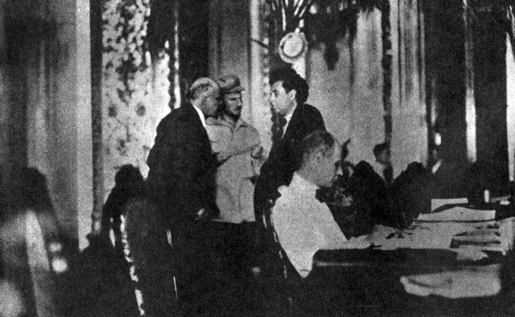 В. И. Ленин, Н. И. Бухарин и Г. Б. Зиновьев на одном из заседаний II Конгресса Коминтерна. Москва, 1920 г.